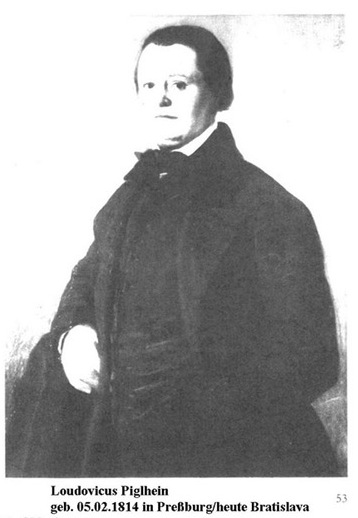 Ölgemälde - Schwarz/Weiß-Foto